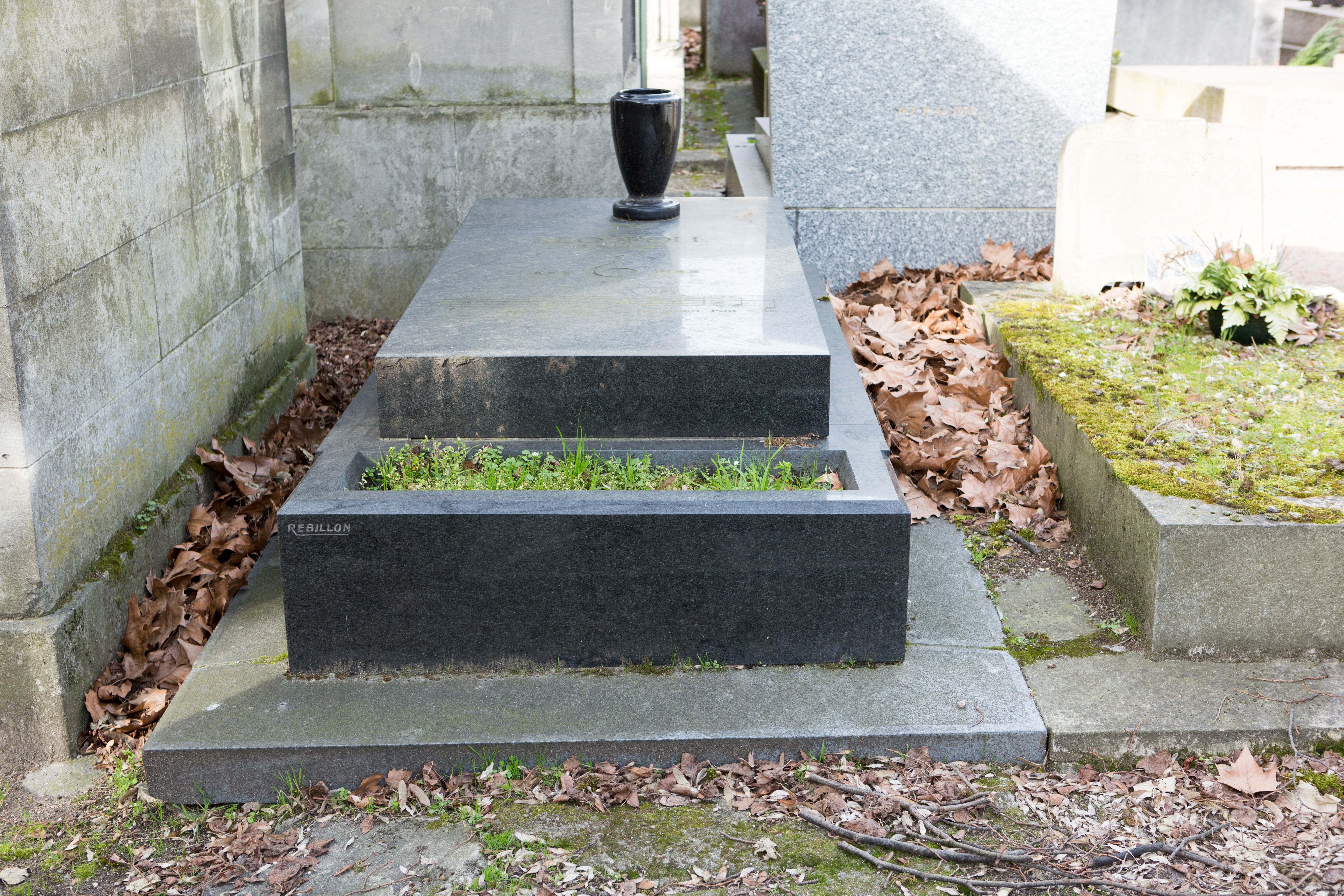 Sépulture de Léo Poll (1899-1988), musicien, compositeur et père de Michel Polnareff.